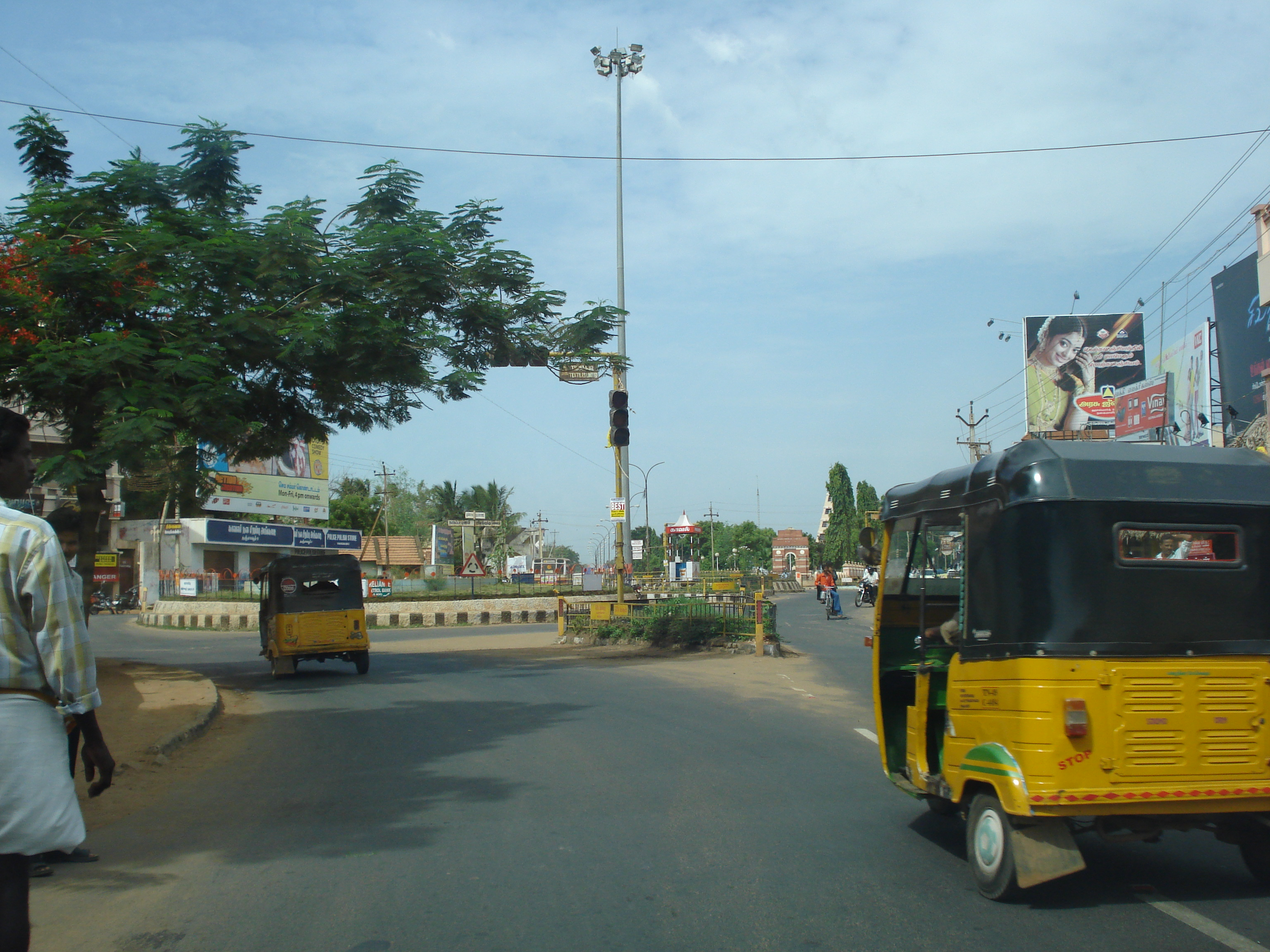 Ramanathan Hospital junction, Thanjavur